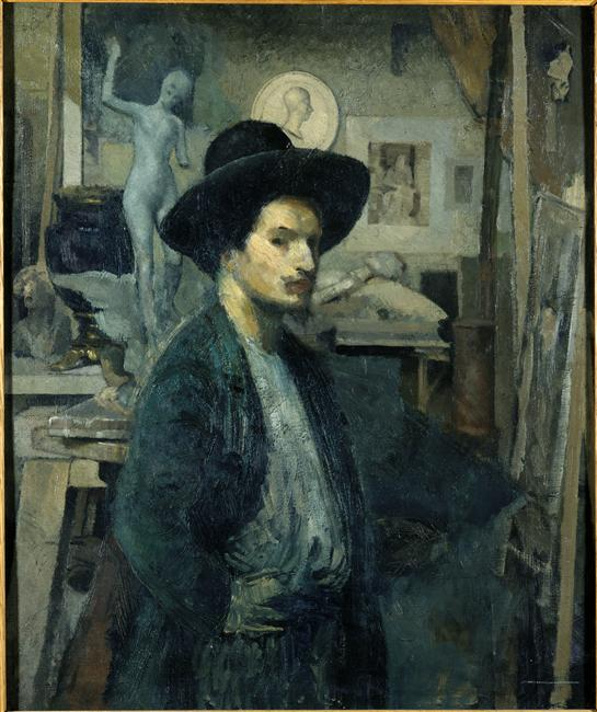 Émile-Antoine Bourdelle (1861-1929), französischer Bildhauer. Selbstporträt.